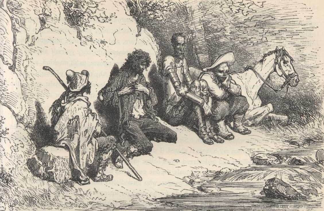 Dom Quixote ouve a história do Roto da Má Figura, ilustração de Gustave Doré para "Dom Quixote" de Miguel de Cervantes